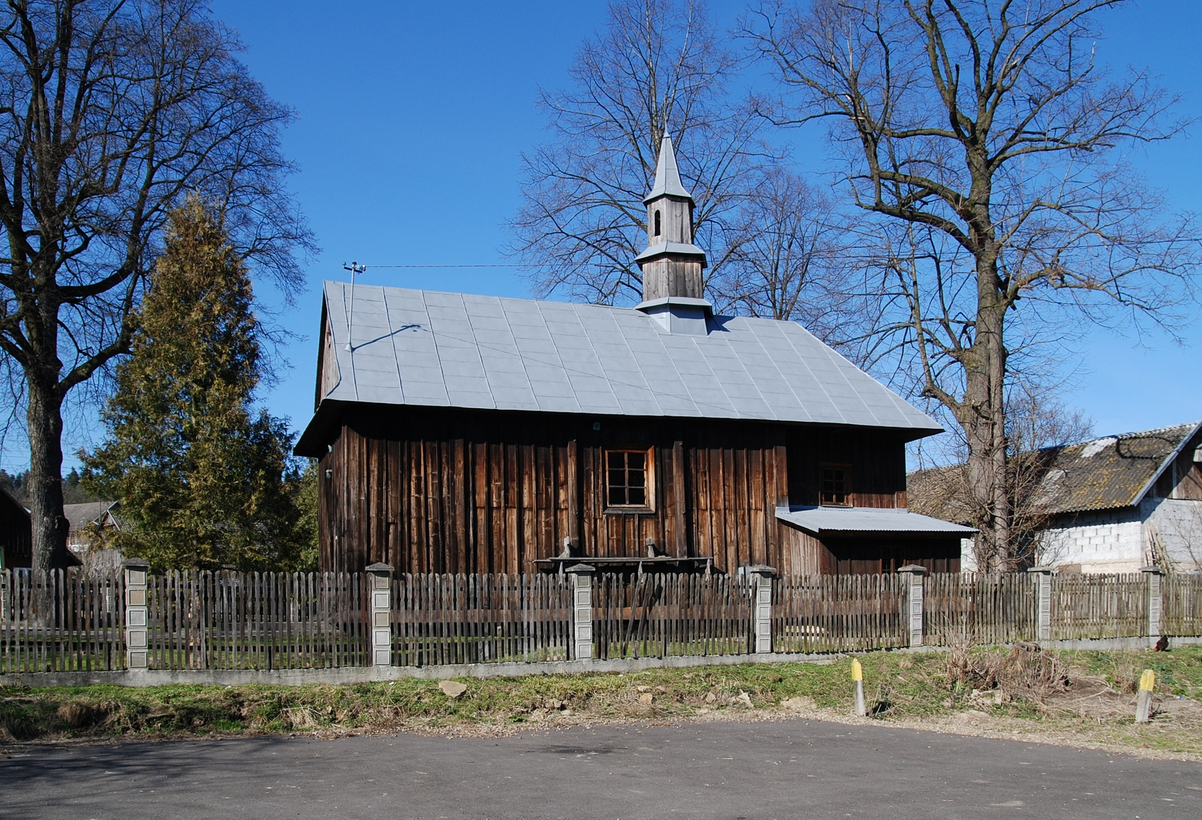 wieś Krzemienna (województwo podkarpackie)